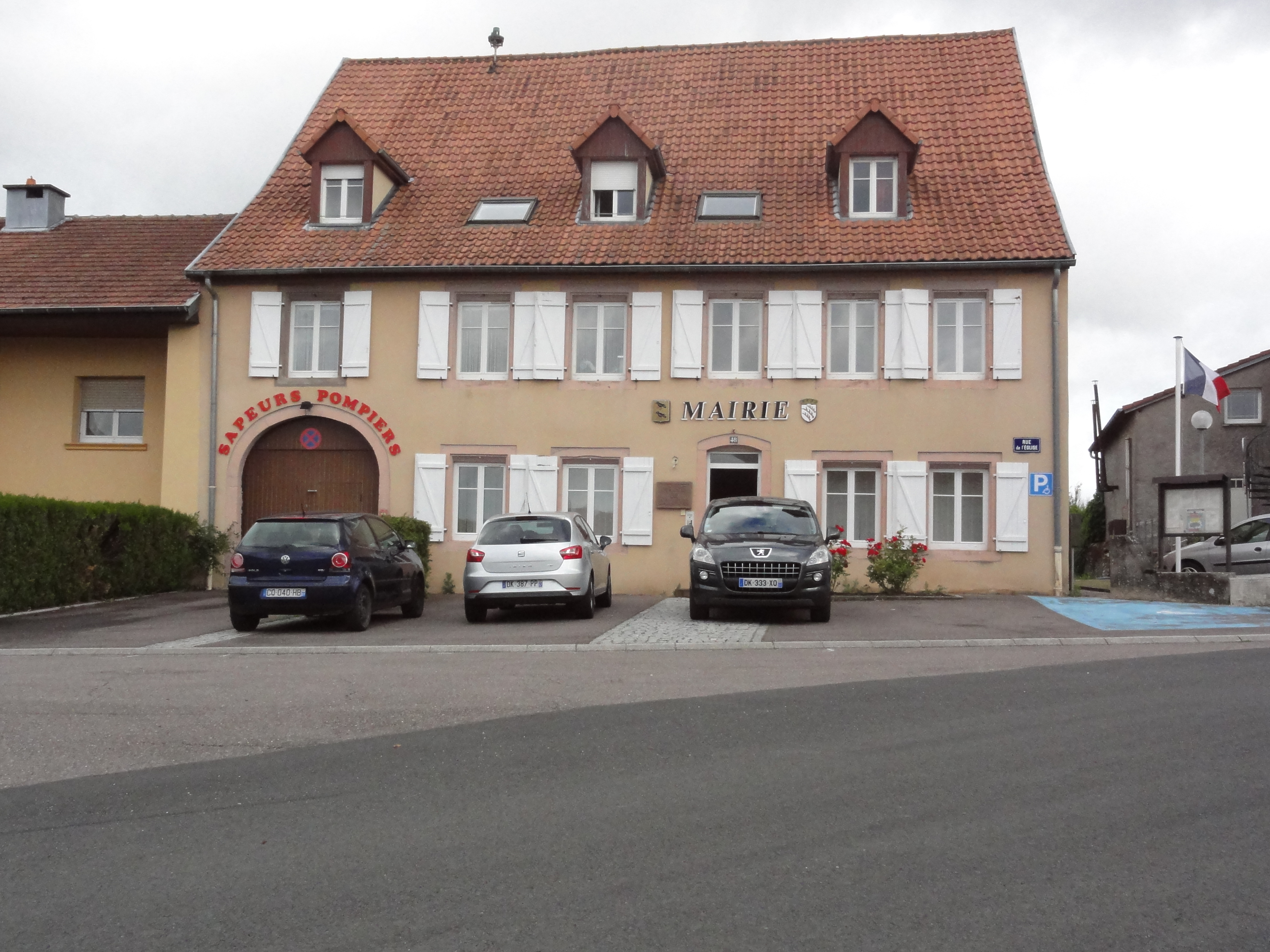 Dolving (Moselle) mairie